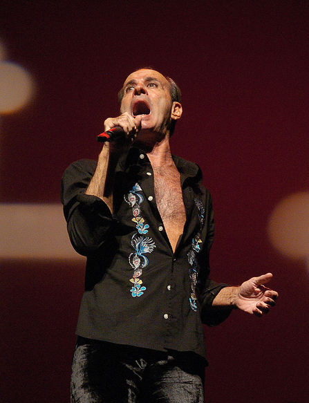 Ney Matogrosso no auditório do Ibirapuera, São Paulo, Brasil, em 12 de fevereiro de 2006